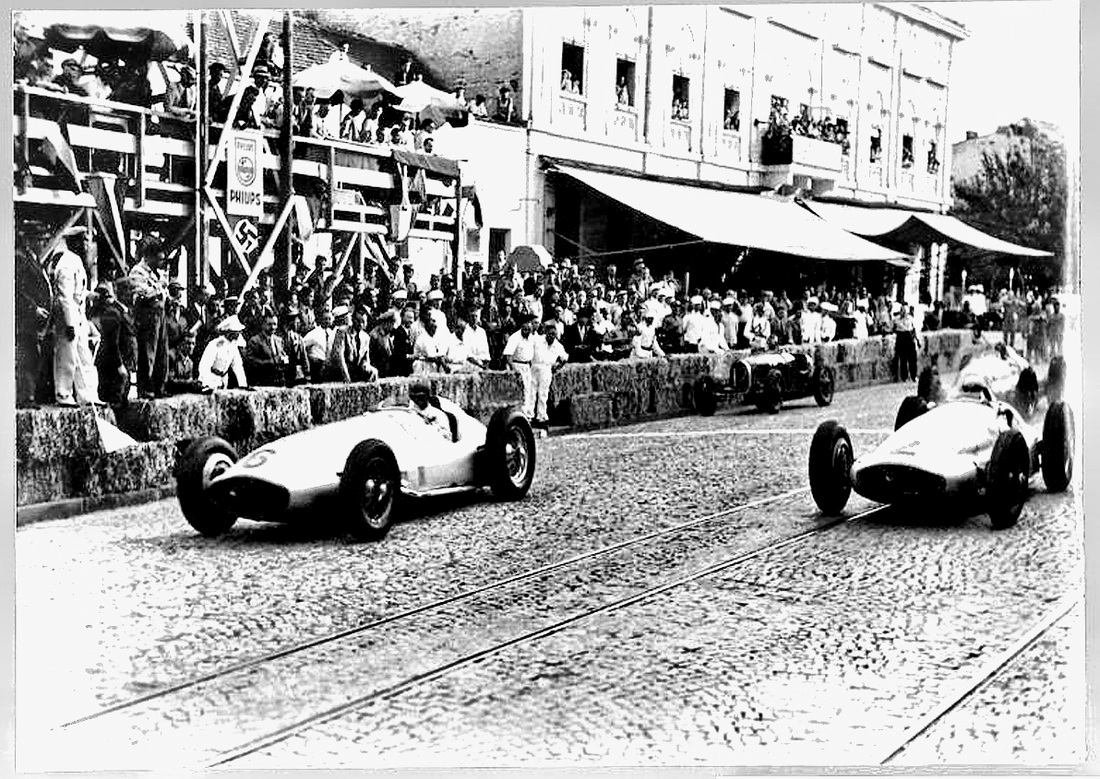 Preteča formule 1 na Kalemegdanu - Međunarodne automobilske i motociklističke trke održane 3. septembra 1939.